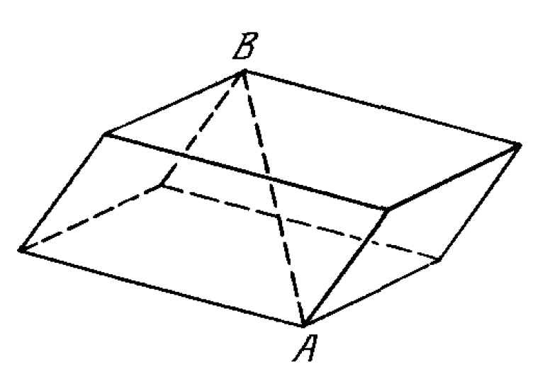 Схематический чертёж